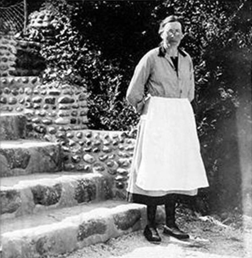 Hilma Svedal vid en trappa på sitt Alaska.